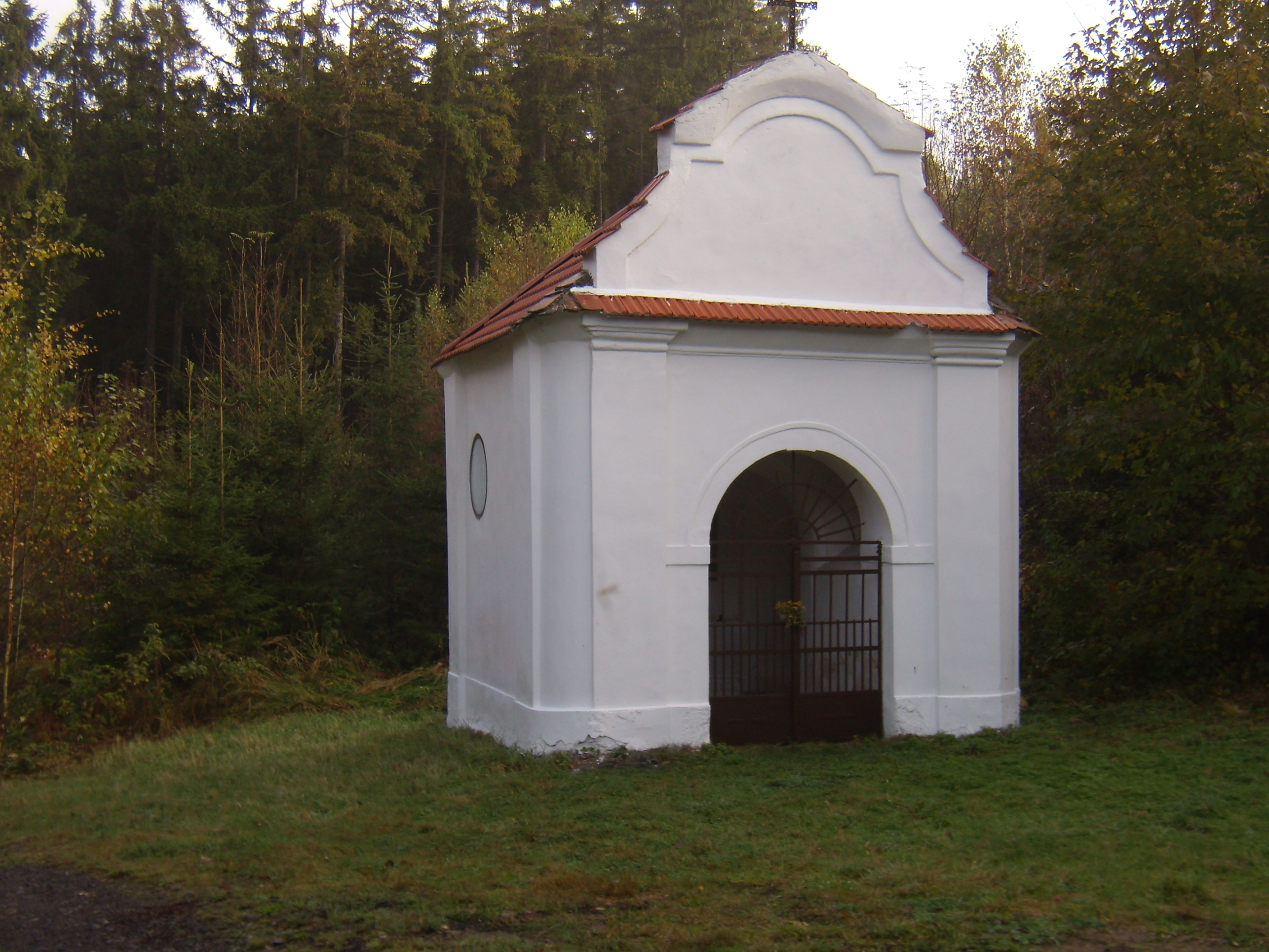 Věckovice - lesní kaplička svatého Blažeje nad obcí